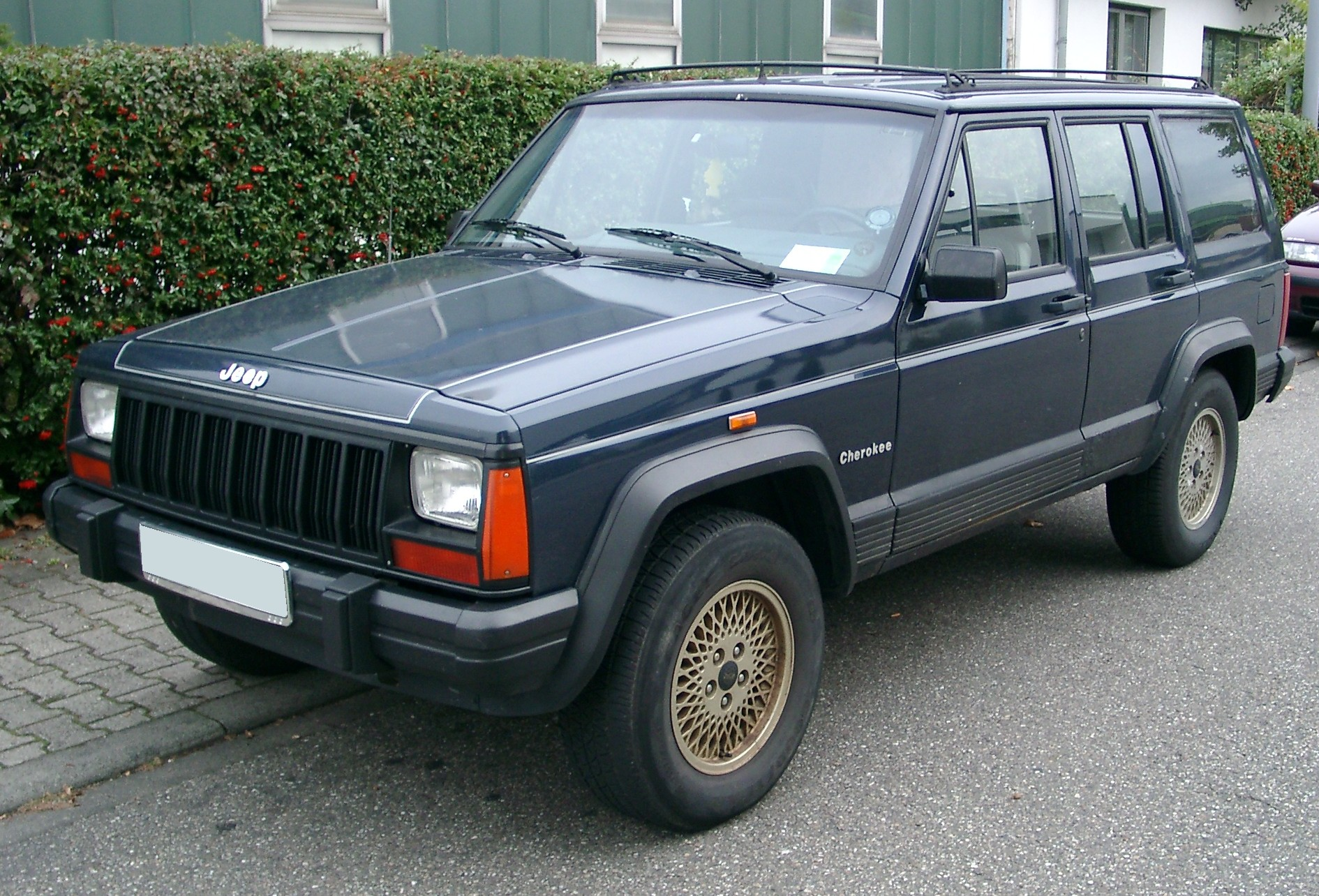 Jeep Cherokee